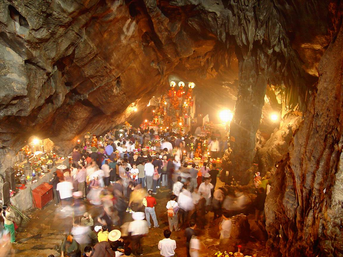 Trong động Hương Tích